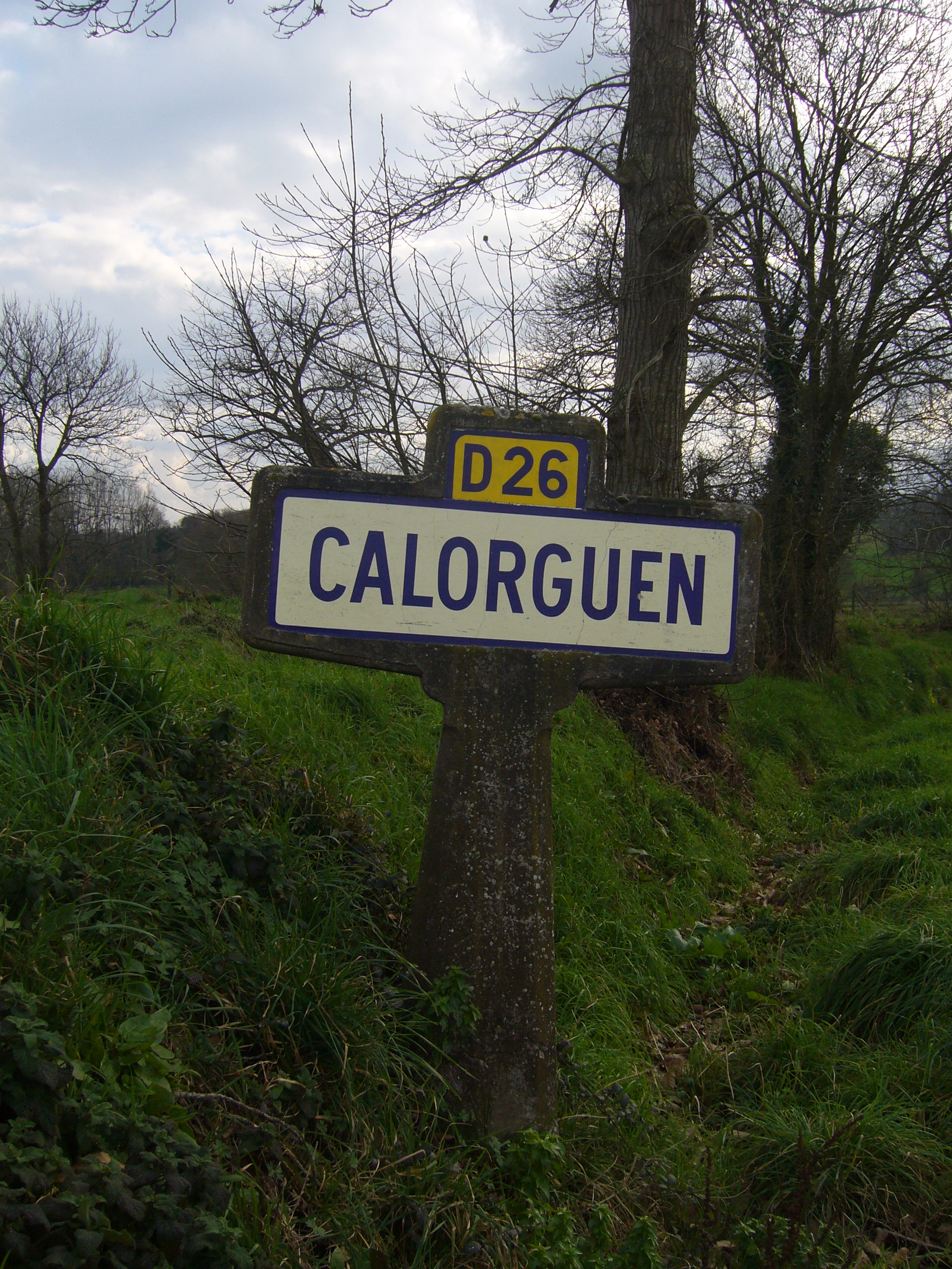 Panneau à l'entrée de Calorguen (Côtes-d'Armor, France) / Entrance of Calorguen's village (Côtes-d'Armor, France)